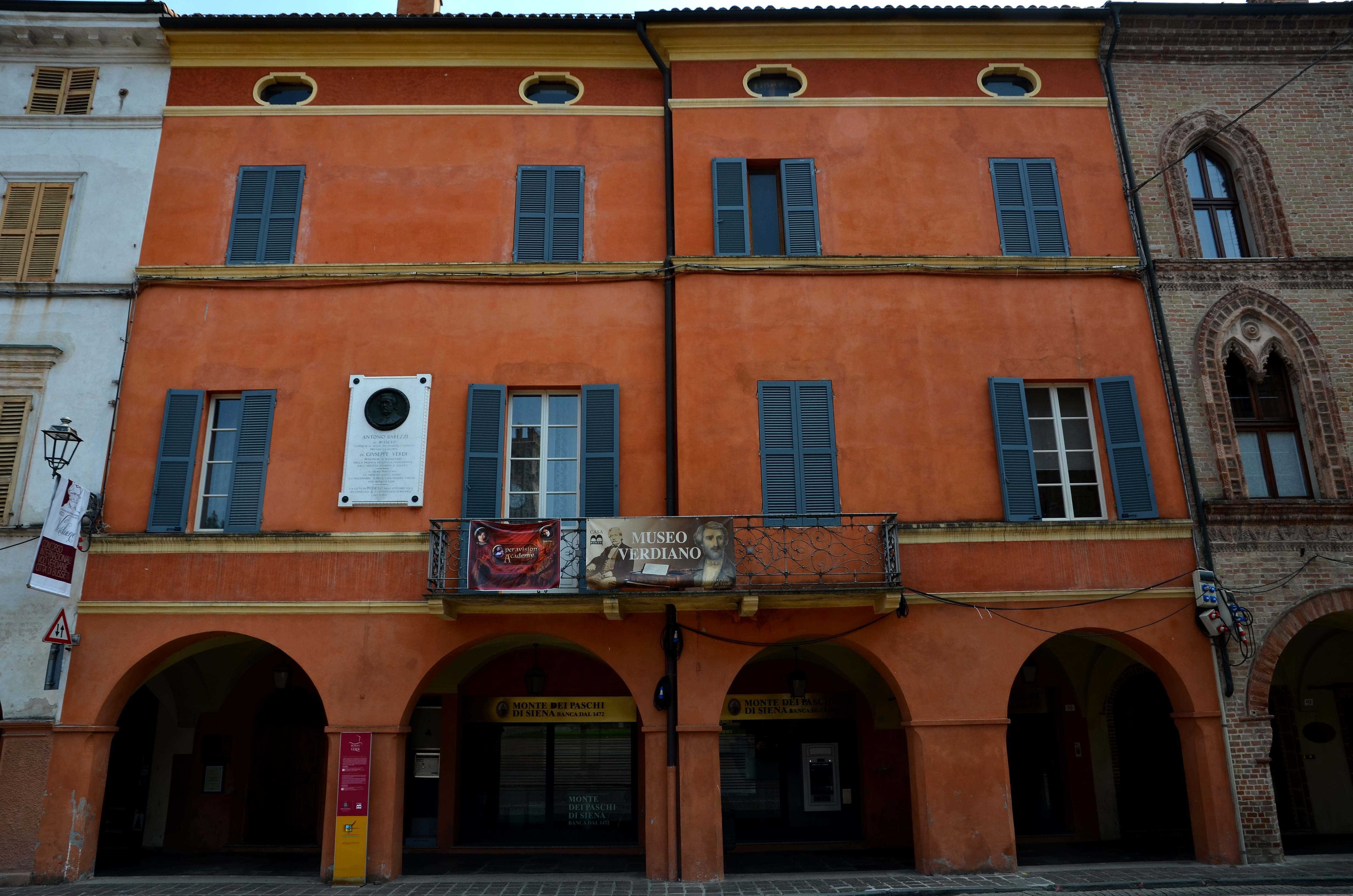 Dům Antonia Barezzi, Busseto - Itálie